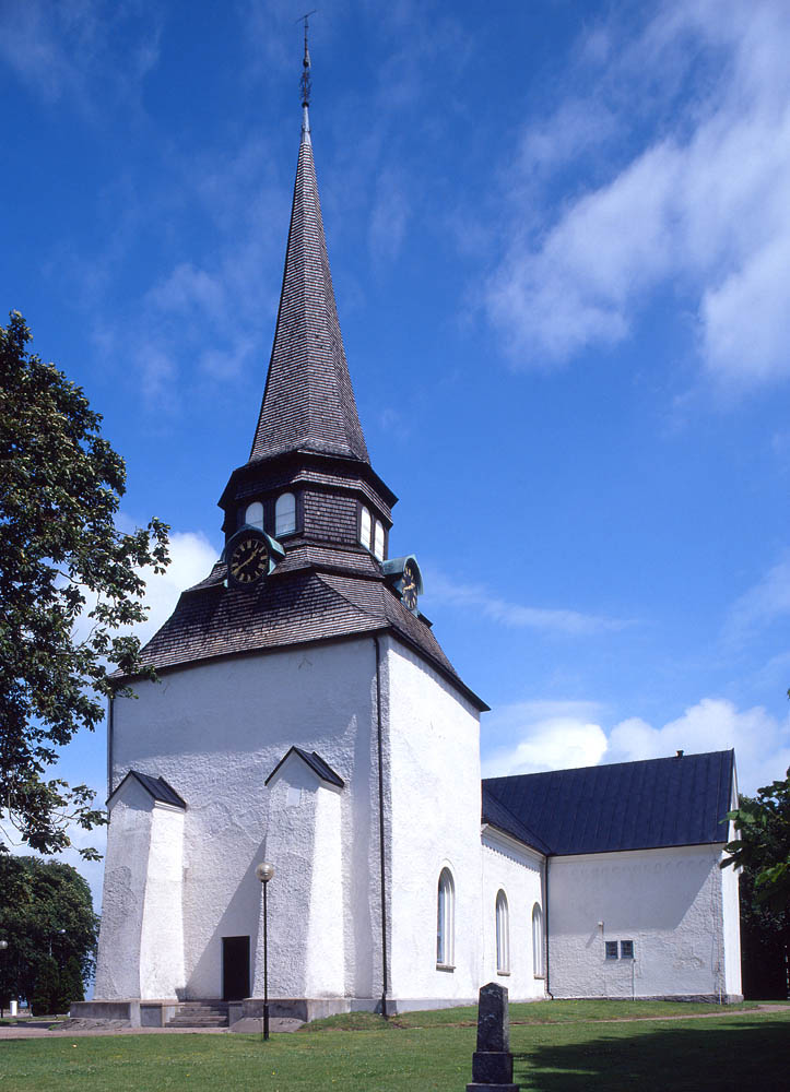 Veinge kyrka i södra Halland. Foto: Åke Johansson